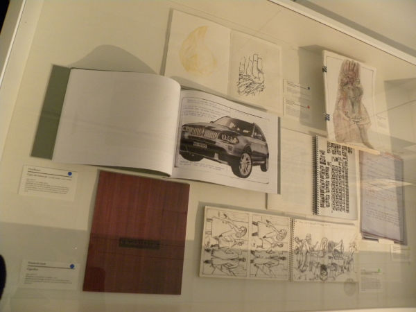 La Bibliothèque Mode de vie à Montreux (Maison Visinand) du 22 janvier au 26 février 2011. Les planches sous vitrine.